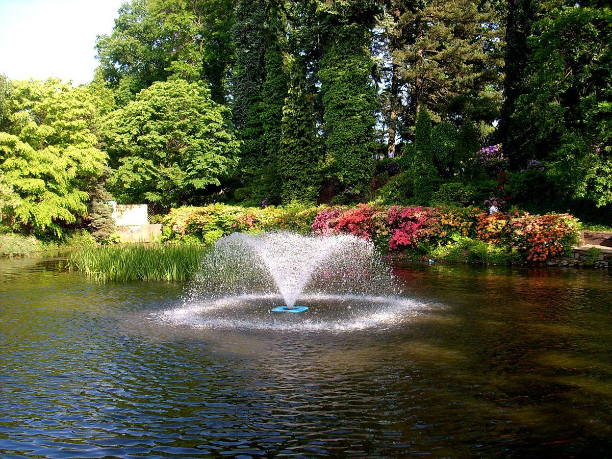 Arboretum w Wojsławicach.